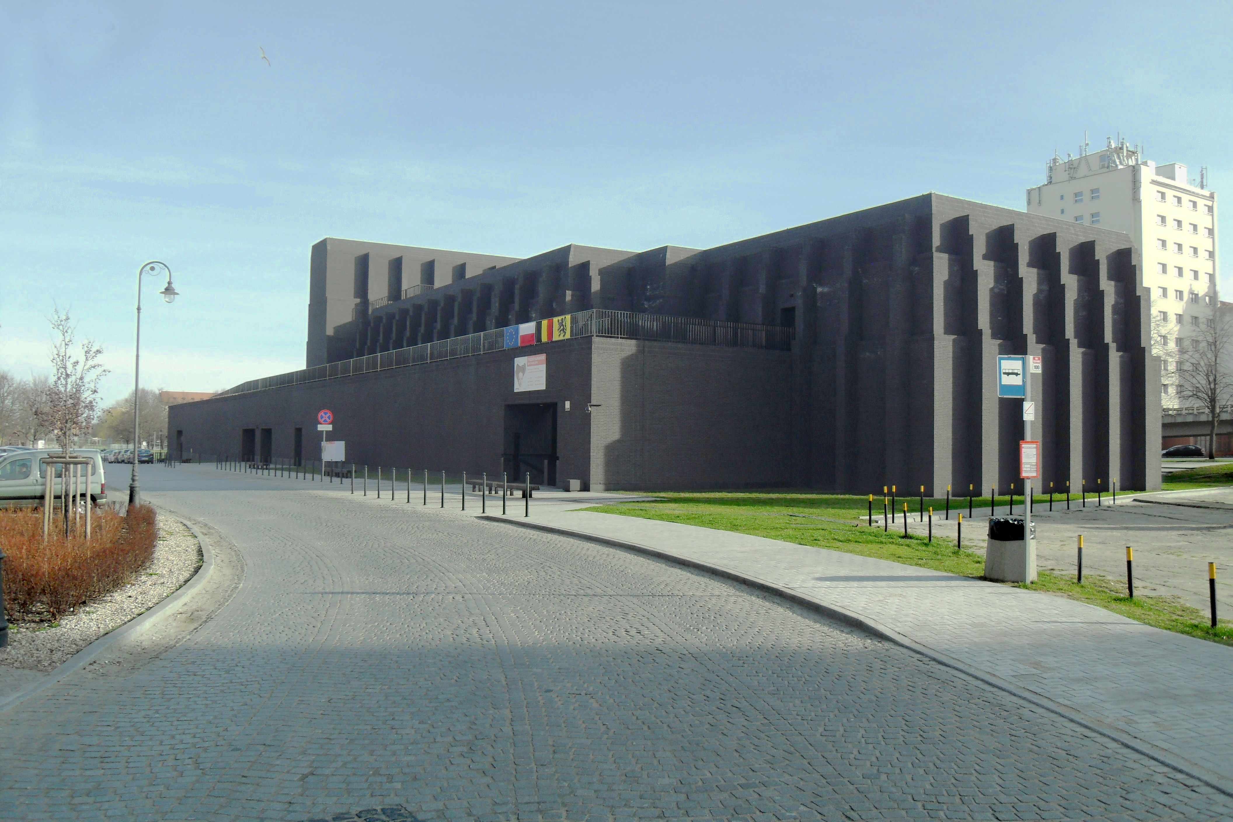 Gdański Teatr Szekspirowski, ul. Bogusławskiego 1.